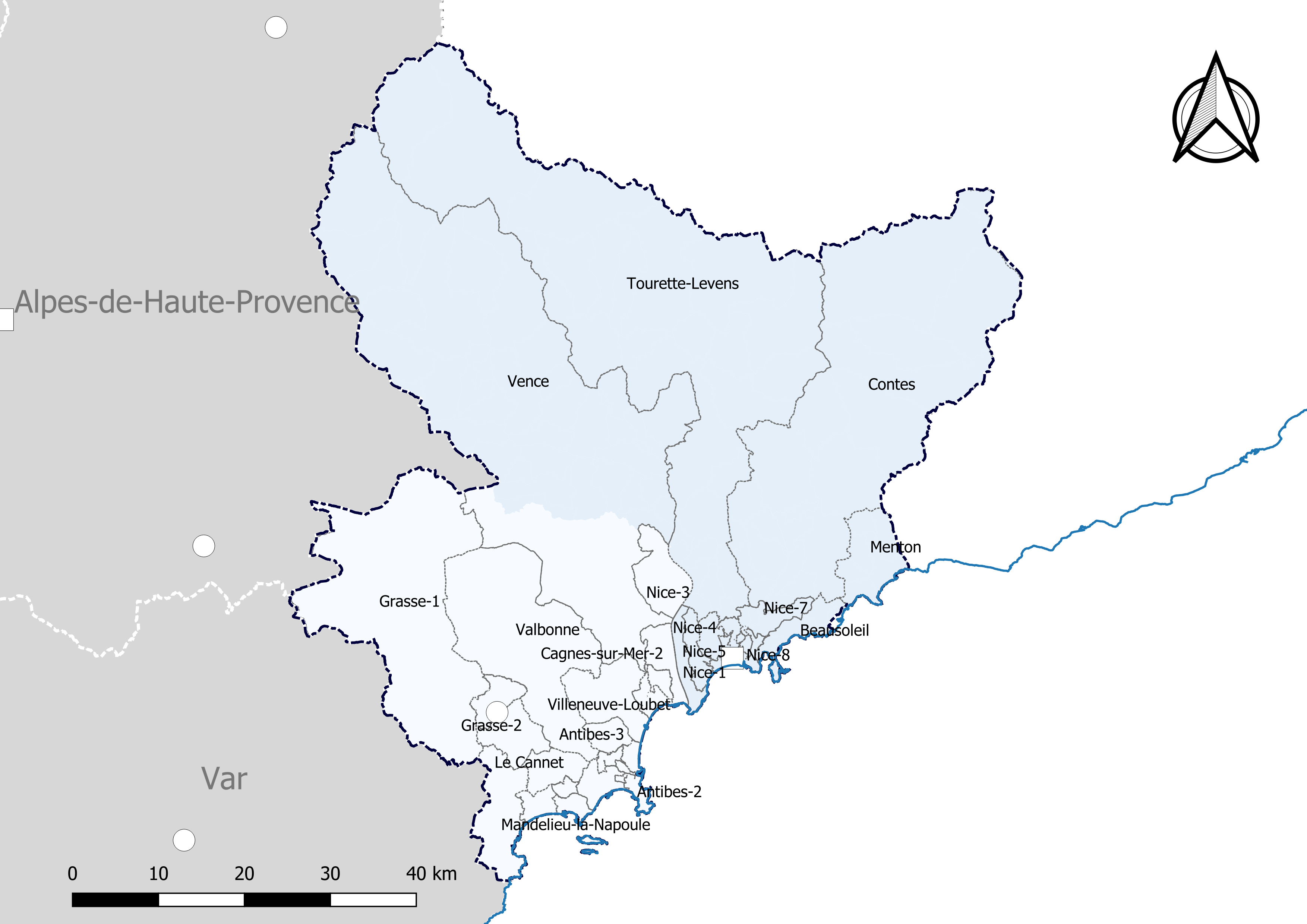 Carte du découpage cantonal du département des Alpes-Maritimes, avec en surimpression les arrondissements (en nuances de bleu) - Carte arrêtée au 1er janvier 2019.